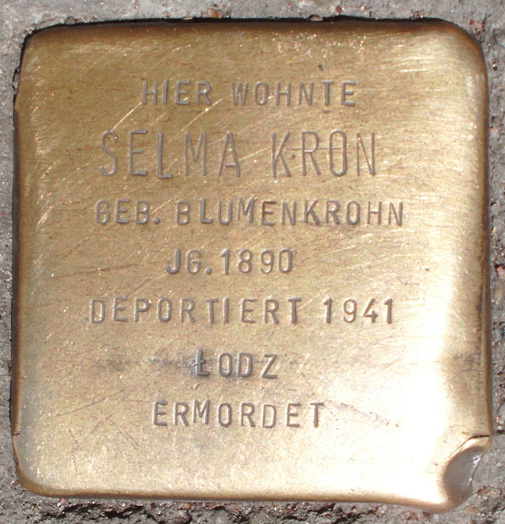 Stolperstein für Selma Kron